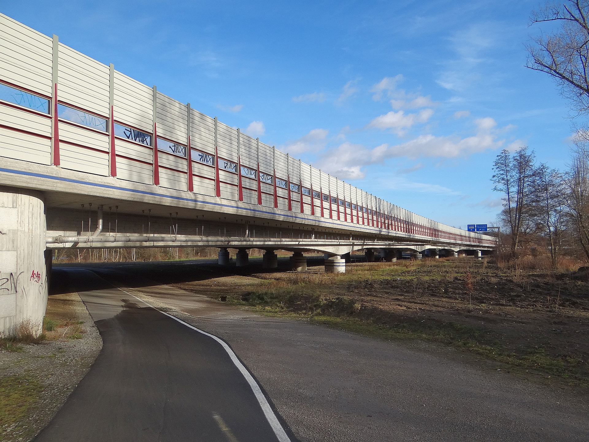 Autobahnbrücke der A39 über die Okeraue im südlichen Kennelgebiet von Braunschweig, Ansicht von Süden.